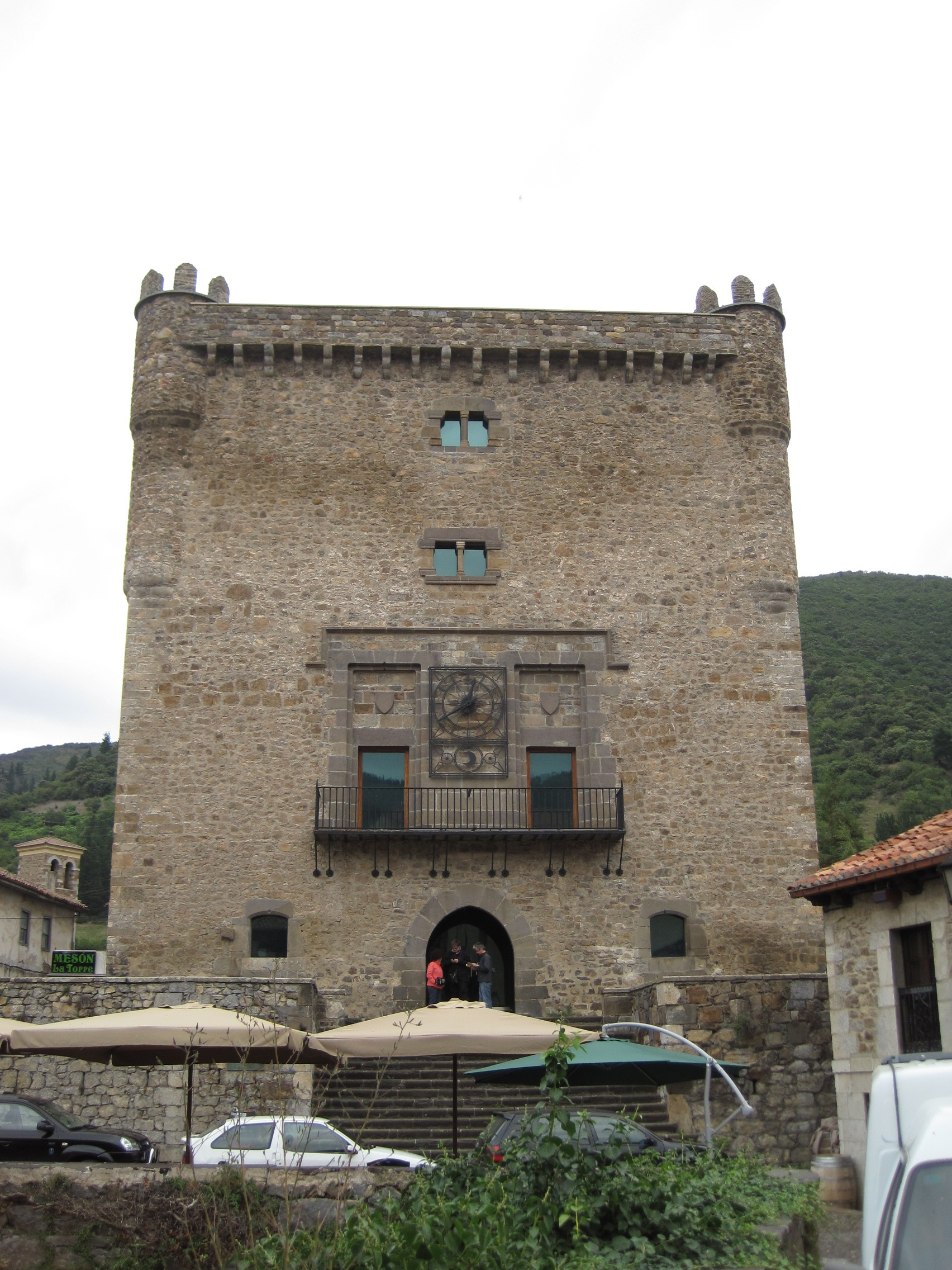 Torre del Infantado, en Potes (Cantabria, España).